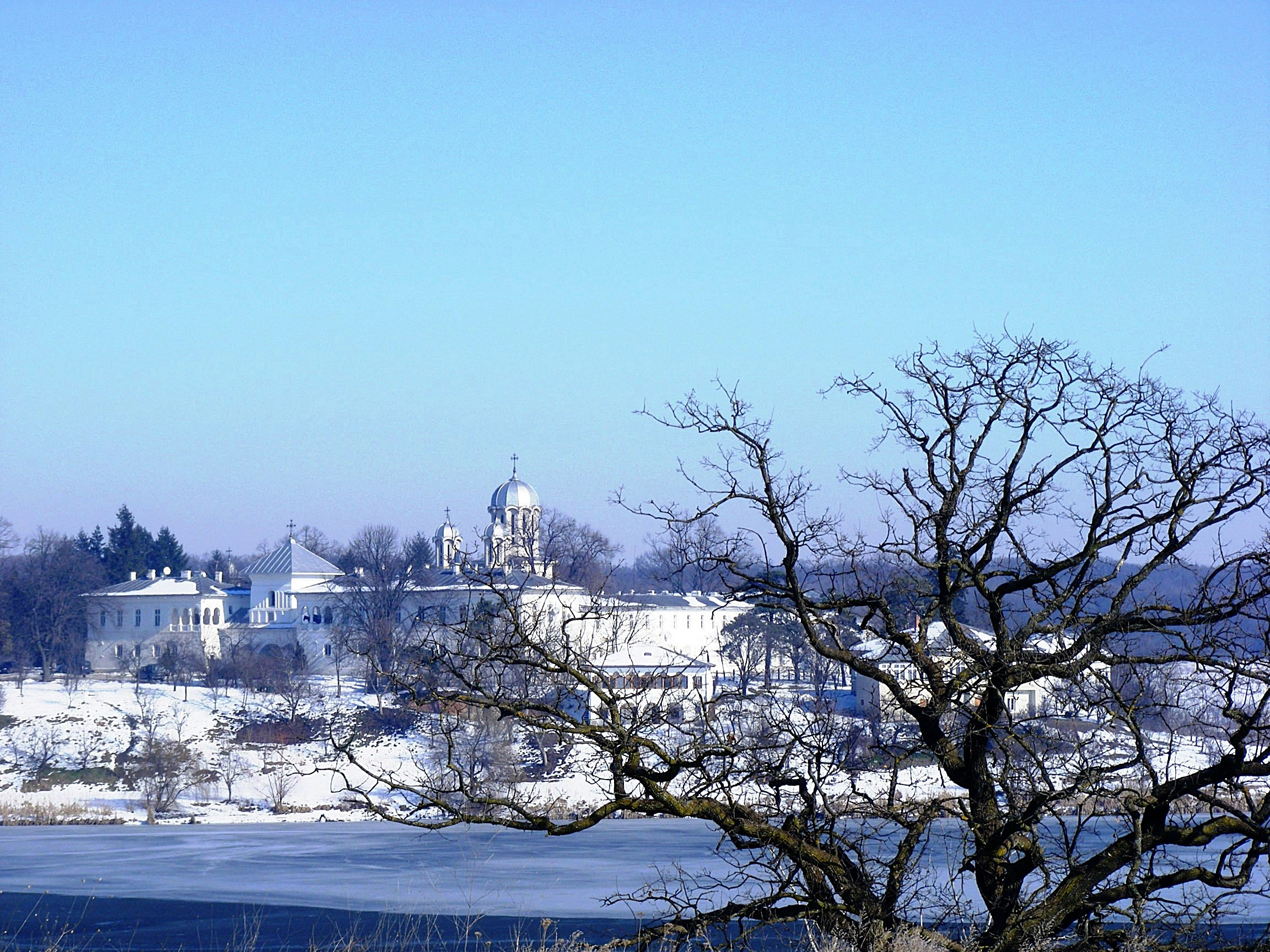 În nesfârşitul codru al Vlăsiei, prea puţin umblat şi cunoscut la începutul secolului al XVII-lea, se înalţă Mănăstirea Căldăruşani, punct viu de spiritualitate românească.Minunatul peisaj care înconjoară lăcaşul religios, a fost remarcat şi de istoricul Nicolae Iorga care îl descria în 1916 astfel: "April a zvârlit acum mantia-i de rege tânăr, numai în catifea verde şi în flori albe peste aceste locuri". "Într-un alt loc pădurile par a se atinge, împrejmuind cu totul zările.